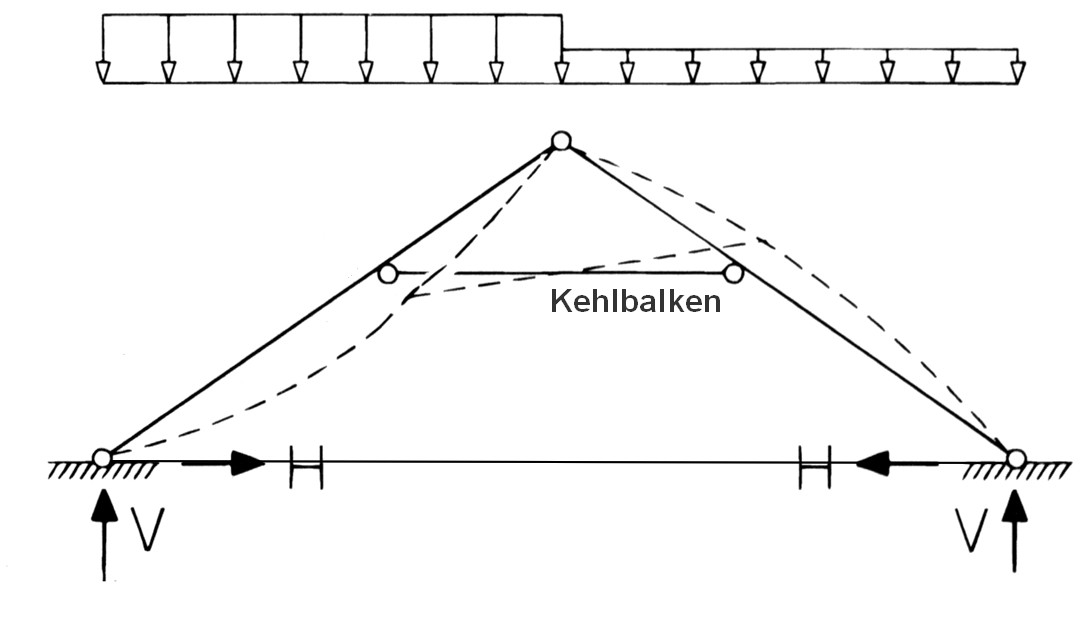 Statisches System eines Gespärres mit Kehlbalken, selbst erstellt, 2002